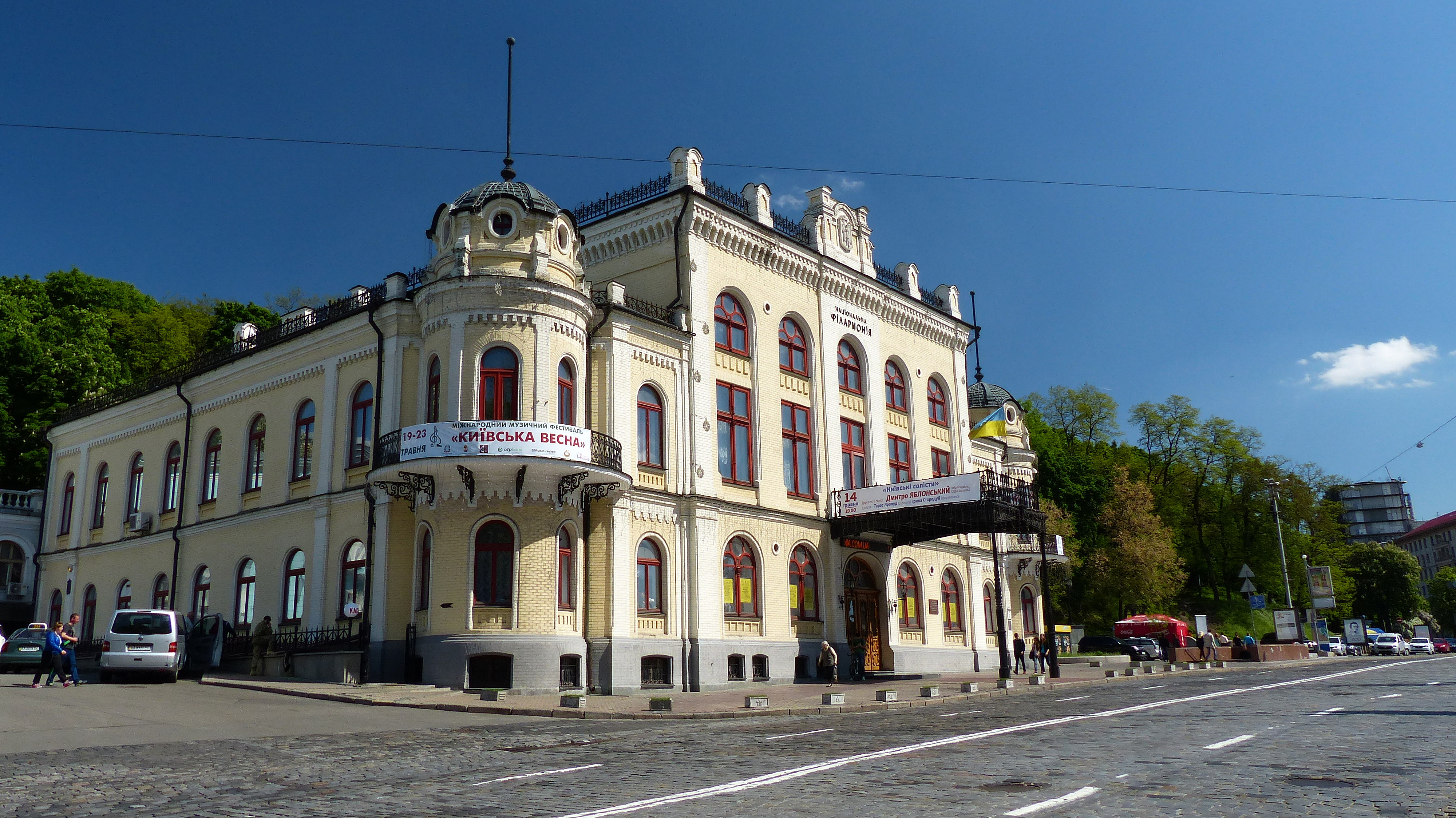 Будинок Купецького зібрання (нині — Національна філармонія), Київ, Володимирський узвіз, 2